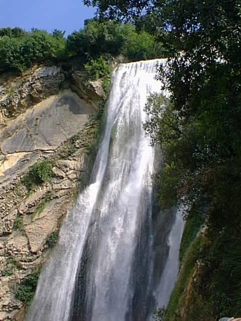 Tivoli (Roma) - la cascata dell'Aniene